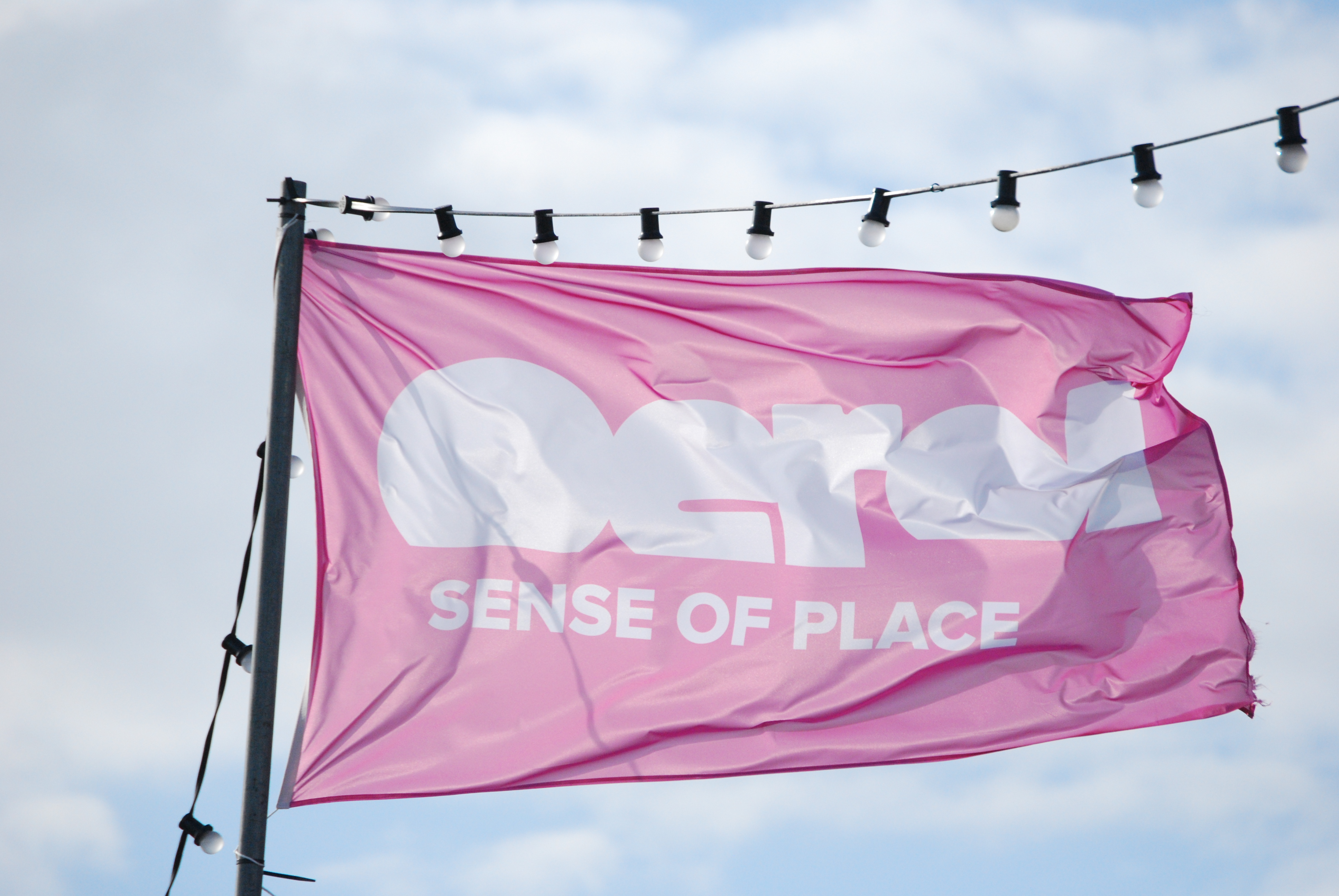 Vlag Oerol Terschelling